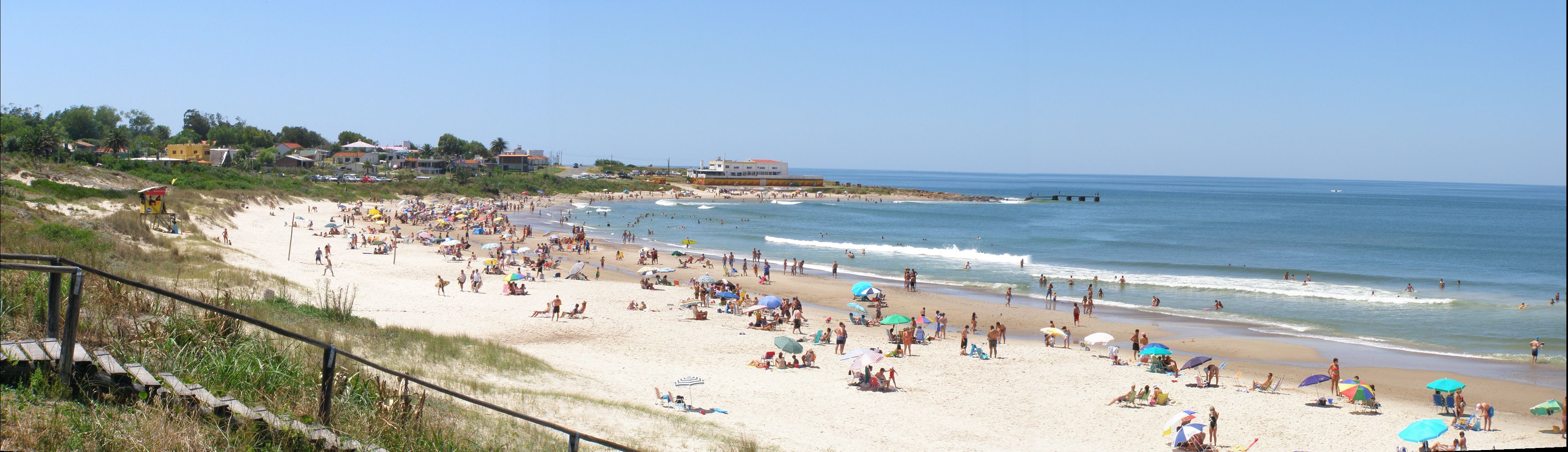 foto panorámica de Cuchilla Alta